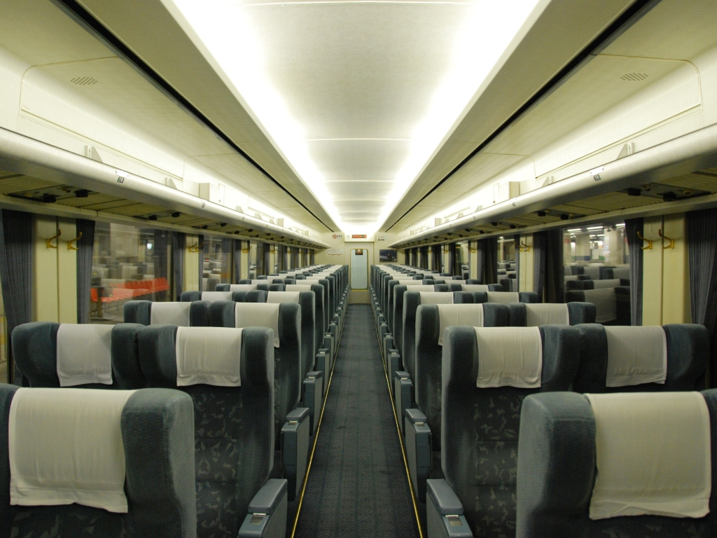 東武100系電車・モハ100-2形（普通車）車内（2009/1/1・北千住にて撮影）